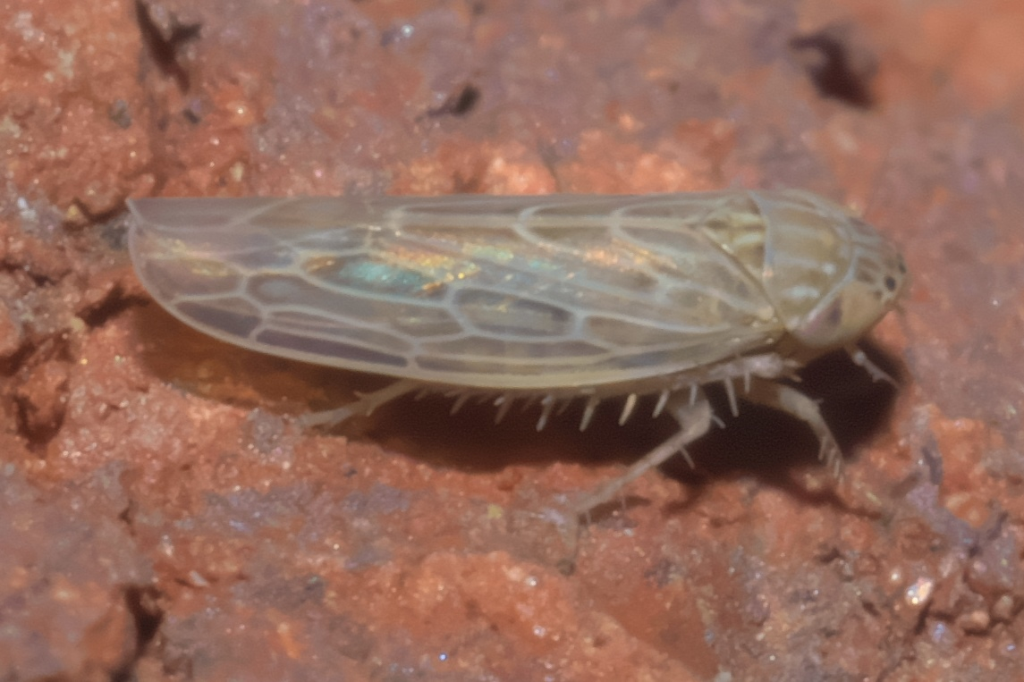 Graminella sonora, Family: Leafhoppers, Size: 3.2 mm, ID Confidence: 88